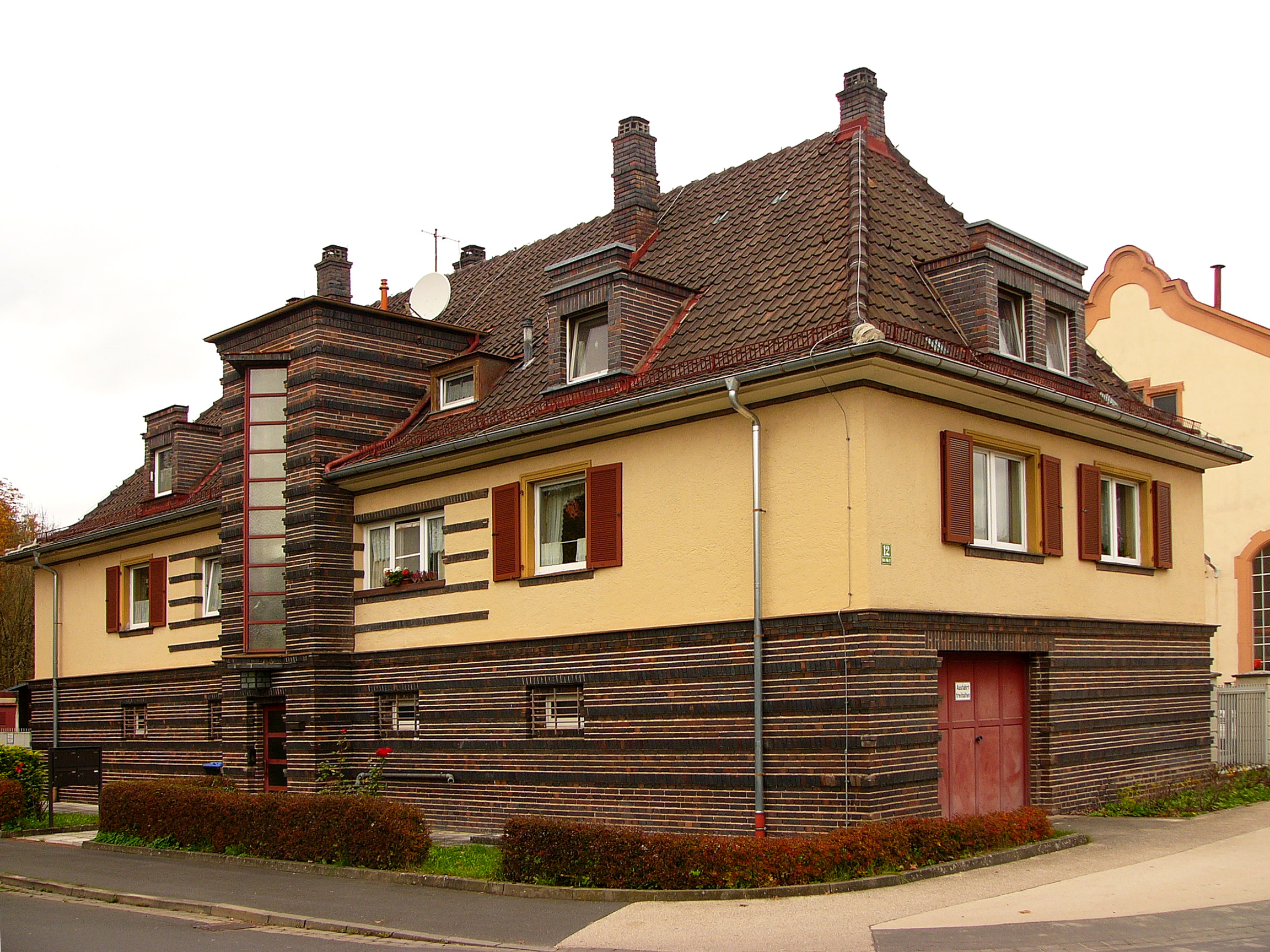 Ehemals Beamtenwohnhaus des benachbarten Elektrizitätswerkes; zweigeschossiger Walmdachbau mit Sockelgeschoss und Treppenturm in Klinkeroptik, expressionistisch, um 1925.This is a photograph of an architectural monument.